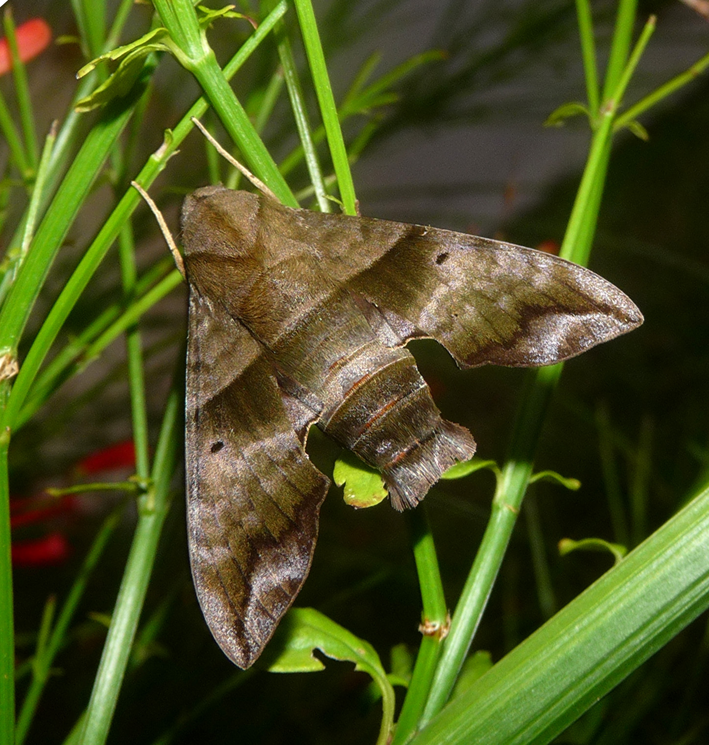 Perigonia lusca. Sphingidae. Macroglossinae.